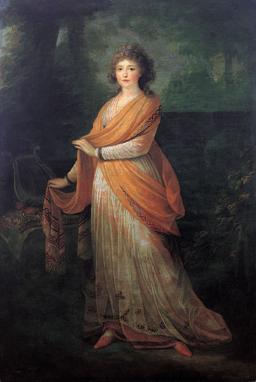 Varvara Golytsyna (Engelhardt) Fürstin Warwara Wassiljewna Galitzin